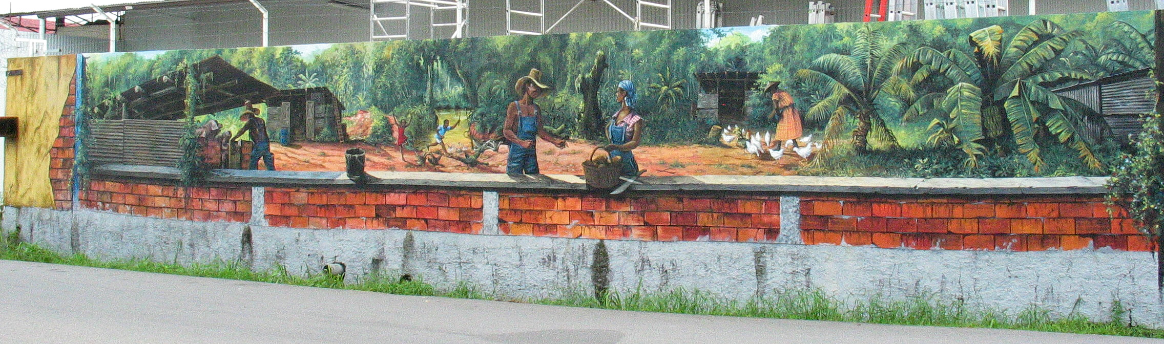 Peinture murale au carrefour Suzini, à Cayenne.